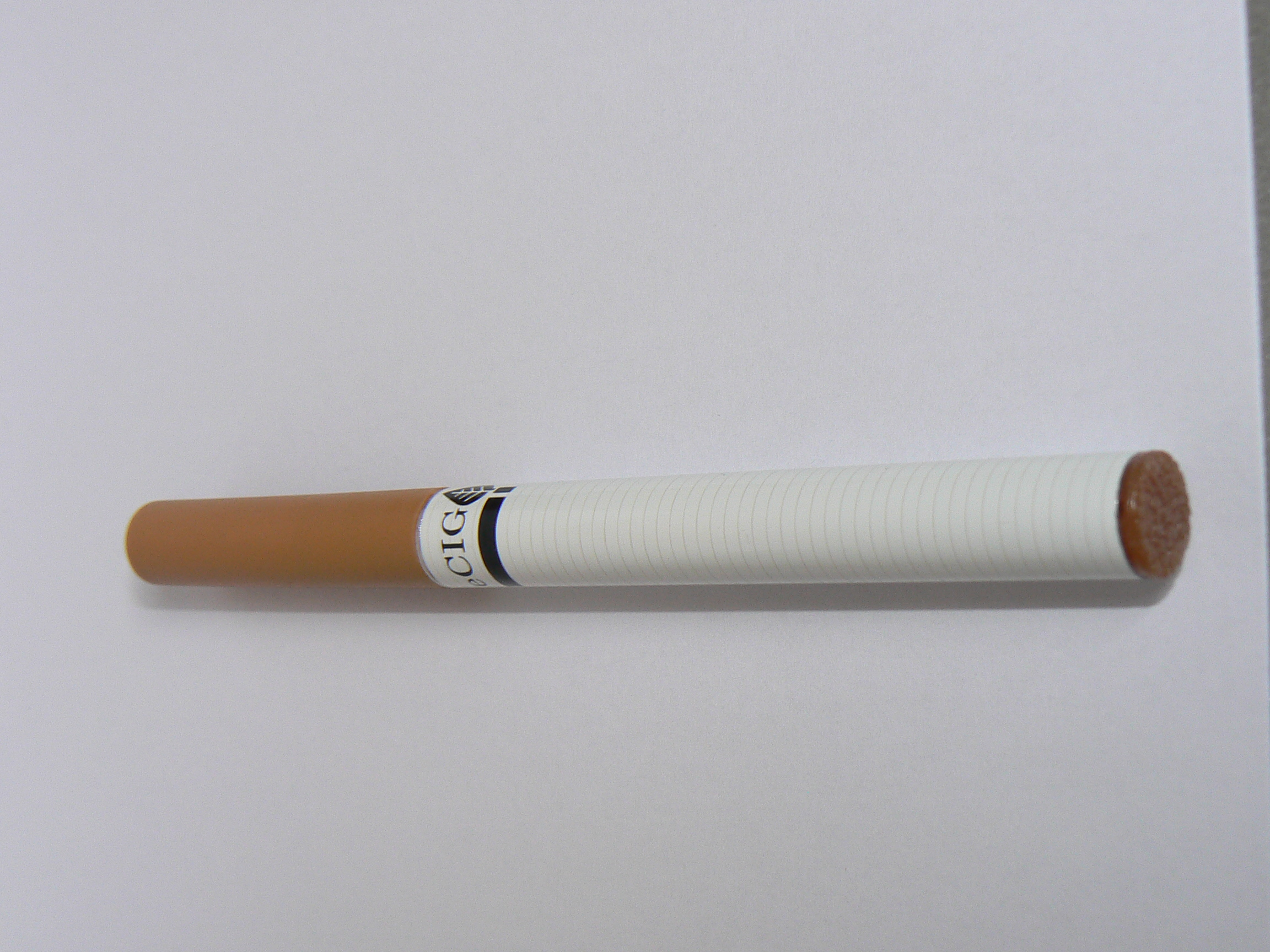 Elektronická cigareta, velmi podobná klasické cigaretě